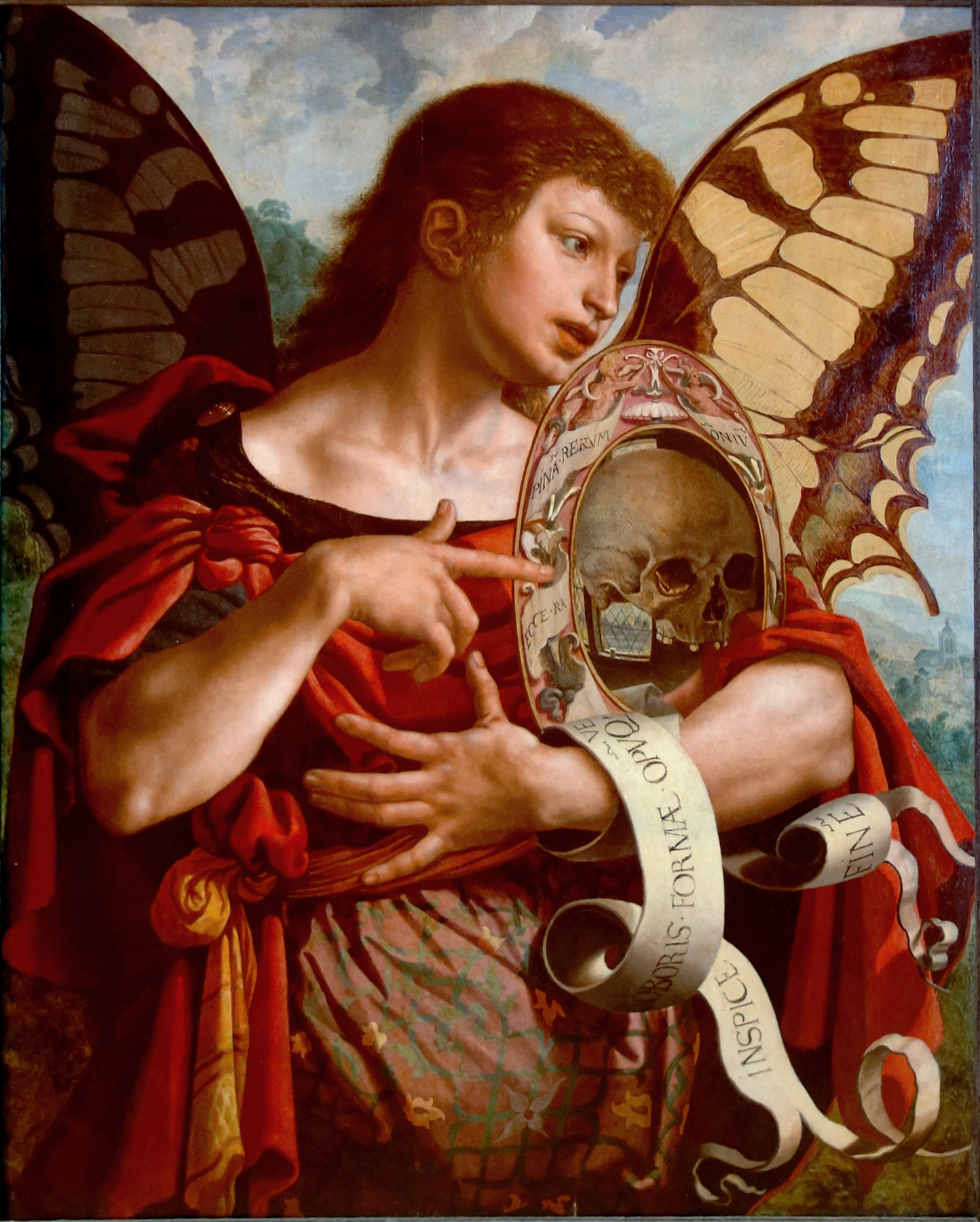 Vanitas